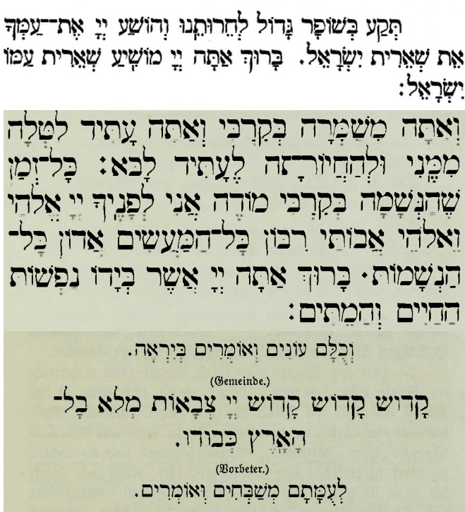 A collage of passages from various Liberal (Reform) prayerbooks in Germany. Top: the revised Ḳibbuẓ Galuyot , 10th benediction in Amidah, in Geiger's 1870 prayerbook. Omitting request for the ingathering of exiles. Middle: Elohai neshama in Vogelstein's 1894 prayerbook. Omitting references to the Resurrection of the Dead, substituted with immortality of the soul. Bottom: Kedushah in a 1881 uncredited Berlin prayerbook, omitting references to the "living creatures" and "wheels" of Ezekiel 3:13